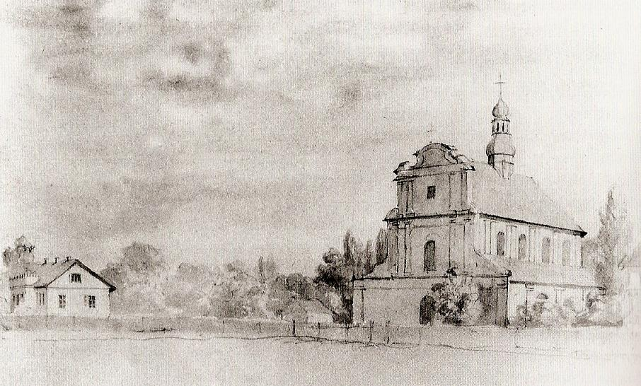 Kościół parafialny w Cudnowie (obraz Napoleona Ordy w Muzeum Narodowym w Krakowie)